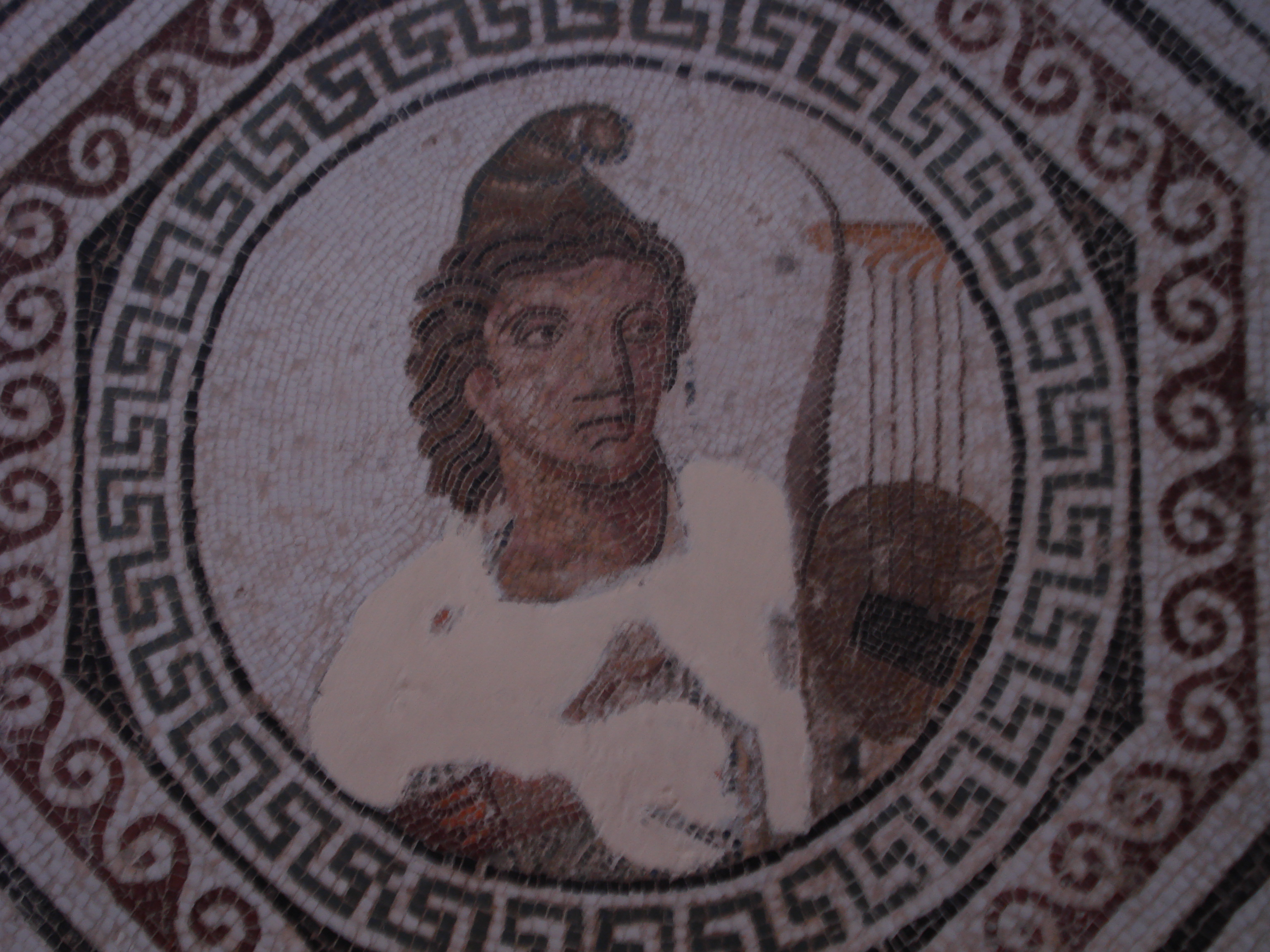 Mosaïque du musée archéologique d'El Jem (Tunisie) découverte dans le quartier Bir Zid et datant du IIe siècle. Il s'agit d'Orphée, dieu de la musique, jouant de la lyre. Sur la mosaïque, il y a autour de lui des animaux sauvages charmés par sa musique.